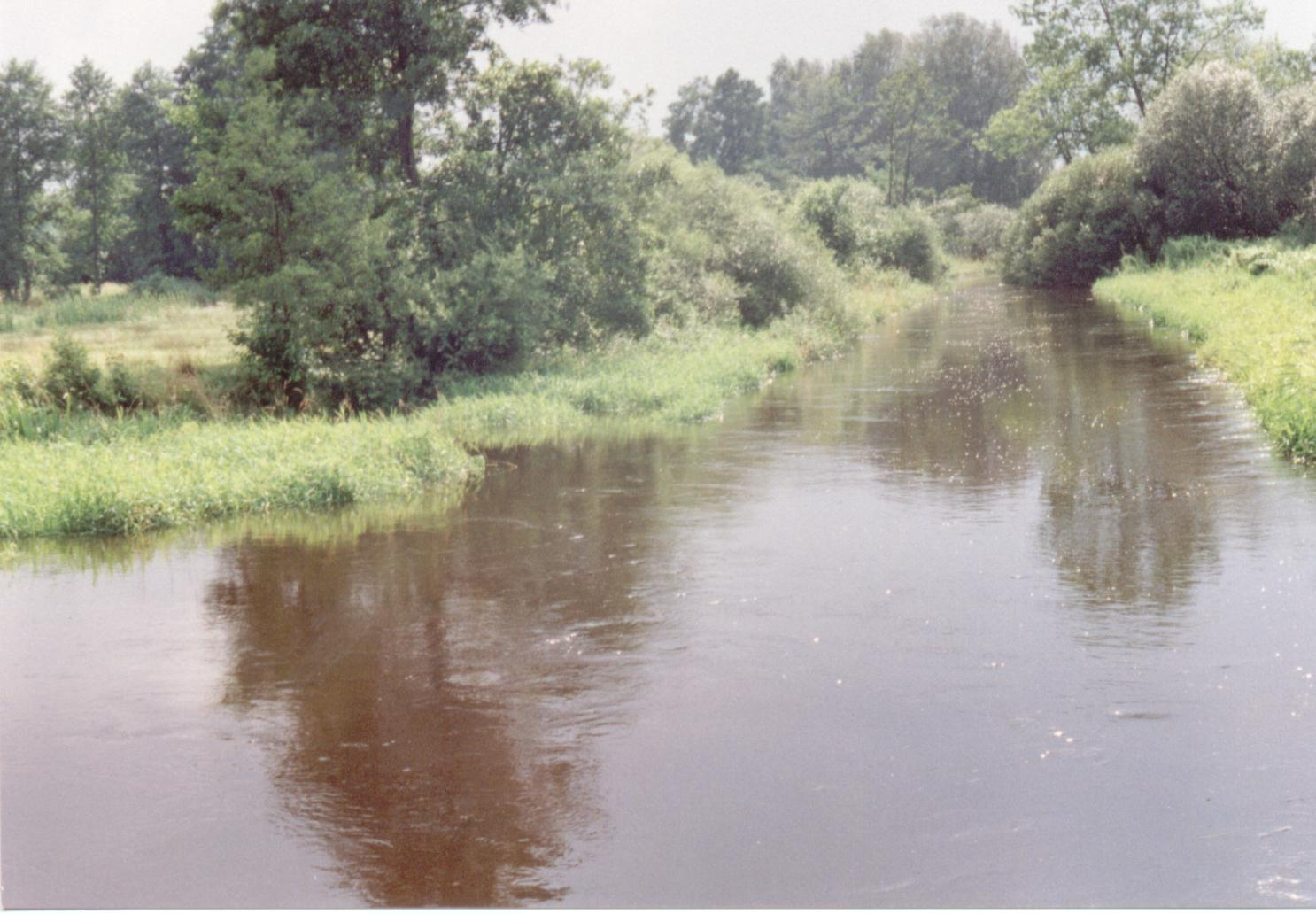 River Rawka in Nowy Dwór (Lodz Voivodship, Poland